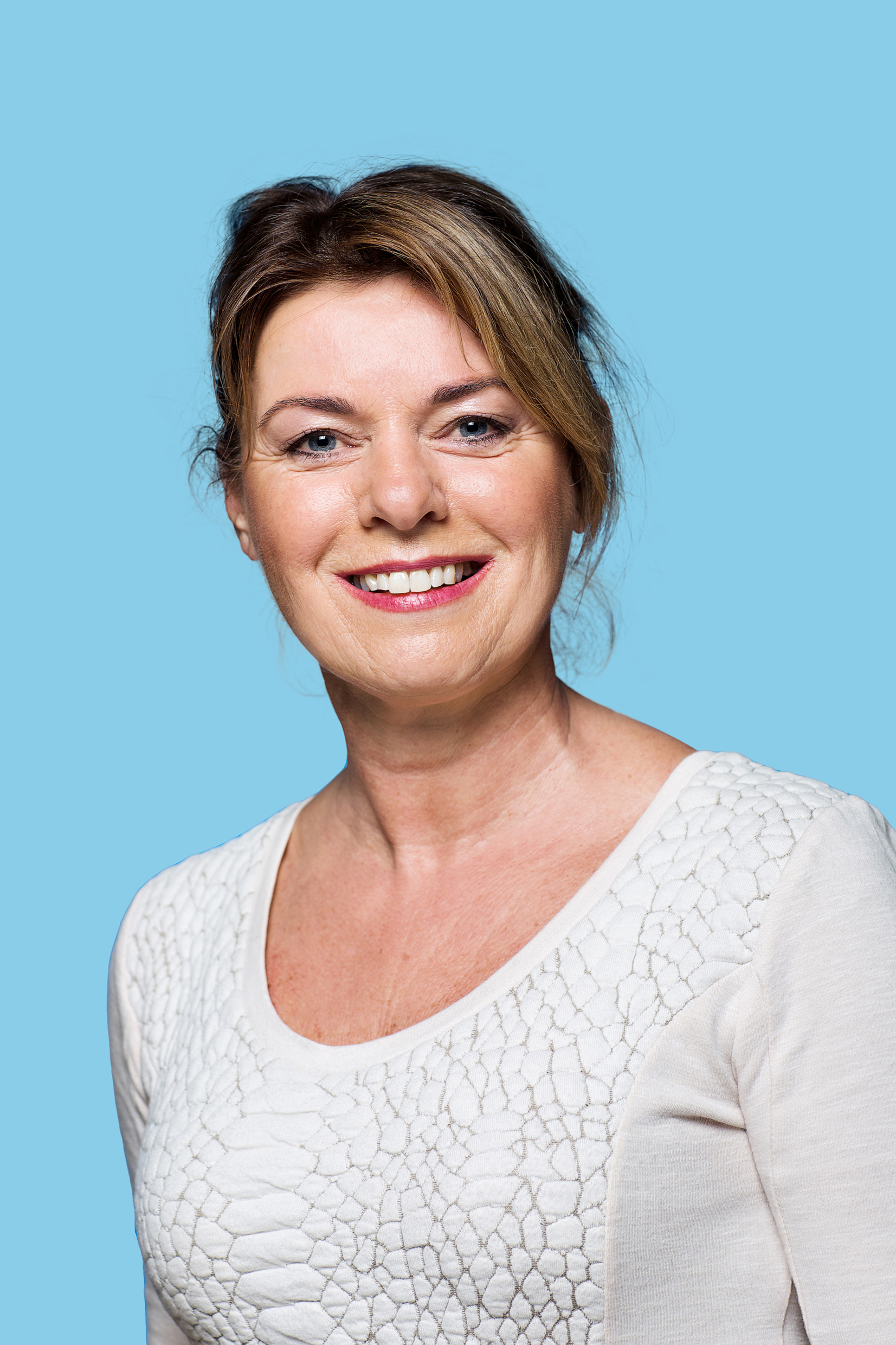 PvdA-lijsttrekker voor de Provinciale Statenverkiezingen in Friesland op 18 maart 2015.